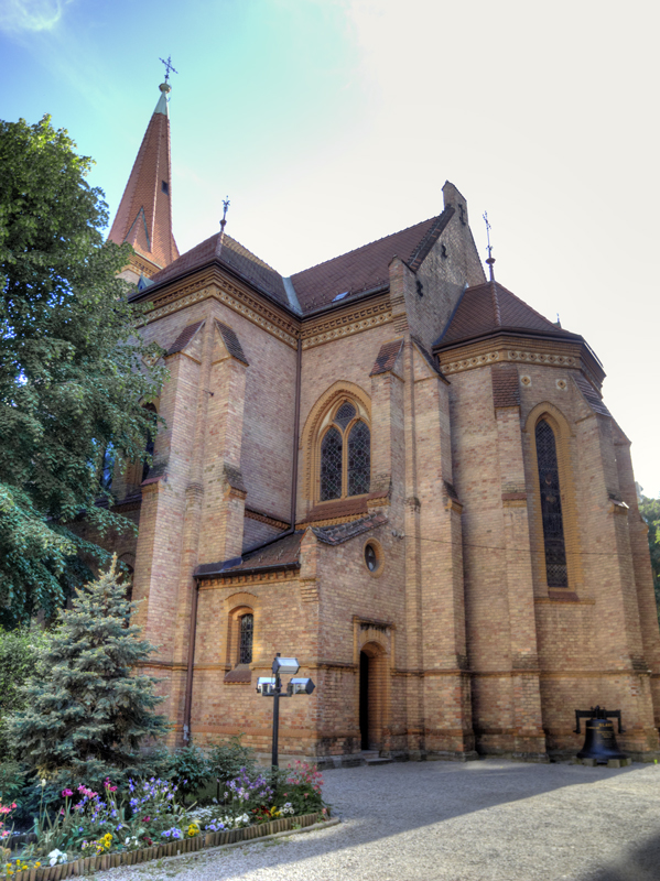 Zagreb